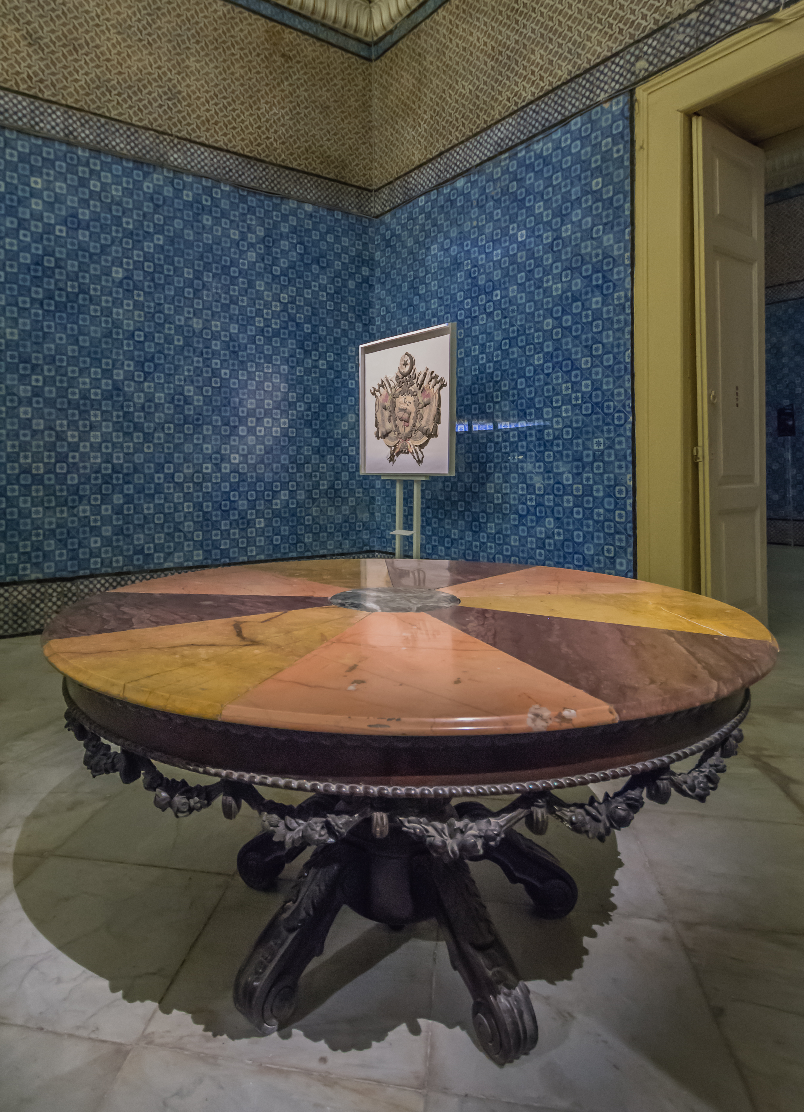 Guéridon sur lequel a été signé le traité du Bardo en 1881 et sur lequel a été signé le document de la nationalisation des terres agricoles en 1964.